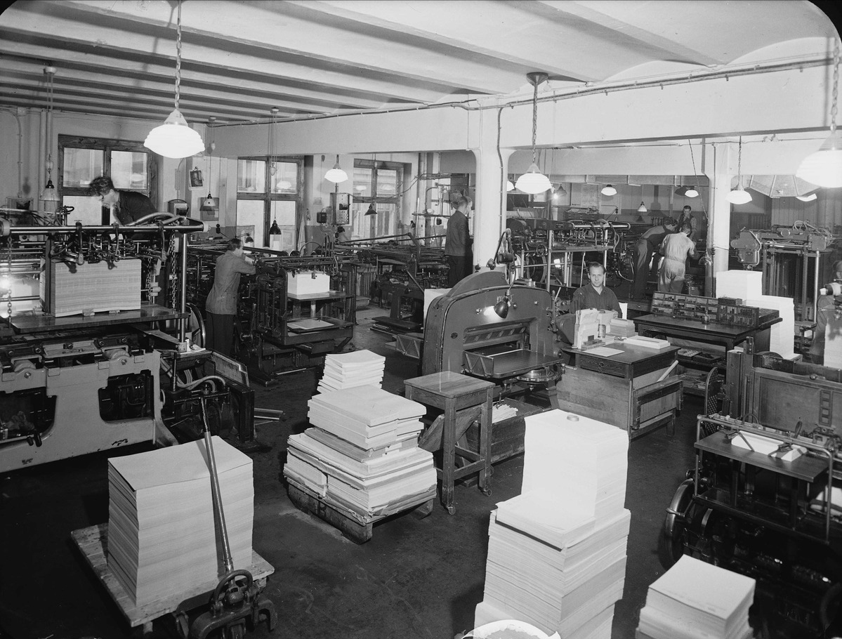 Emil Moestues trykkeri i Skippergata 38-40, Oslo, 1949